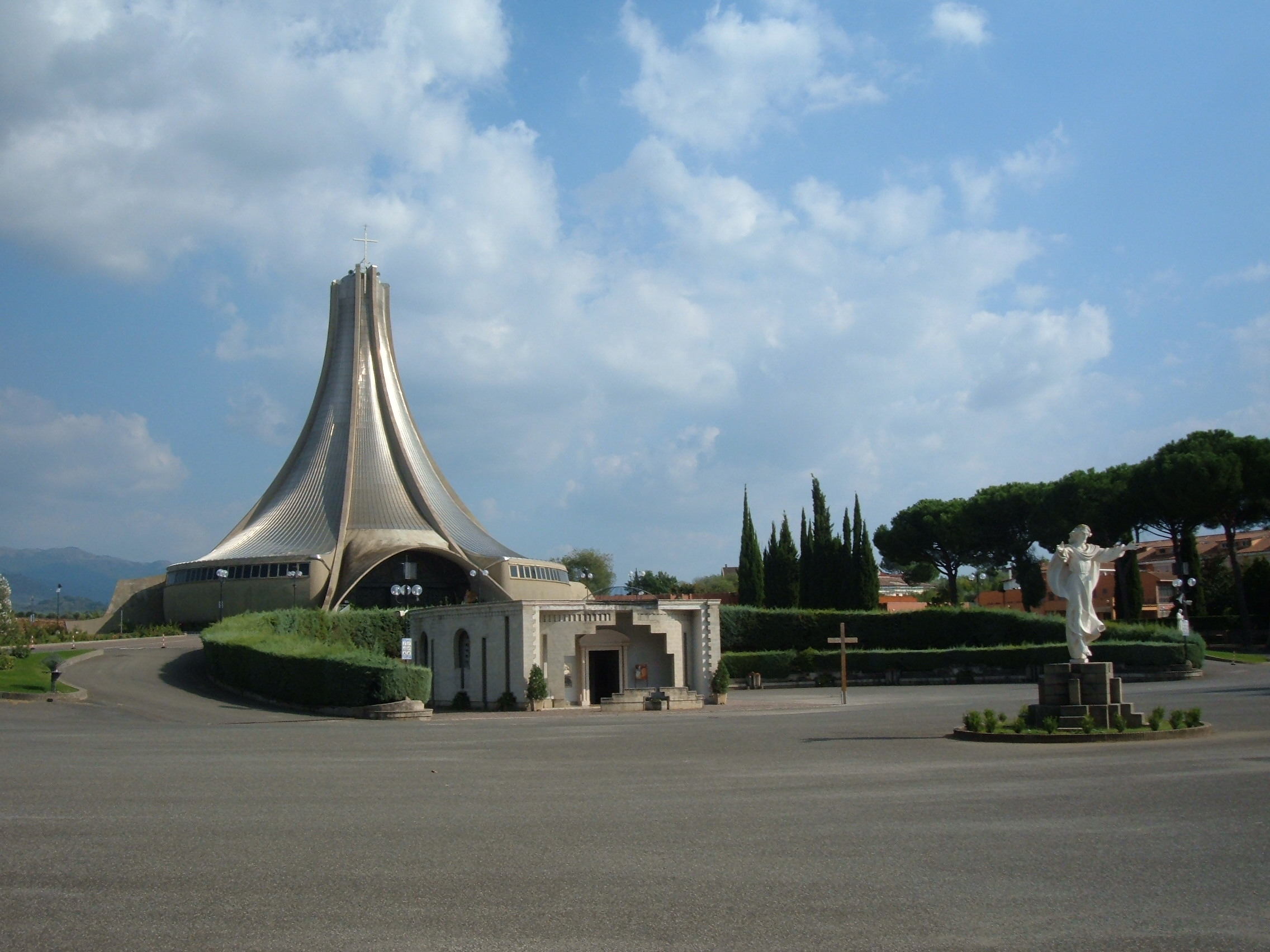 Santuario di Nostra Signora di Fatima, a San Vittorino Romano (Roma).